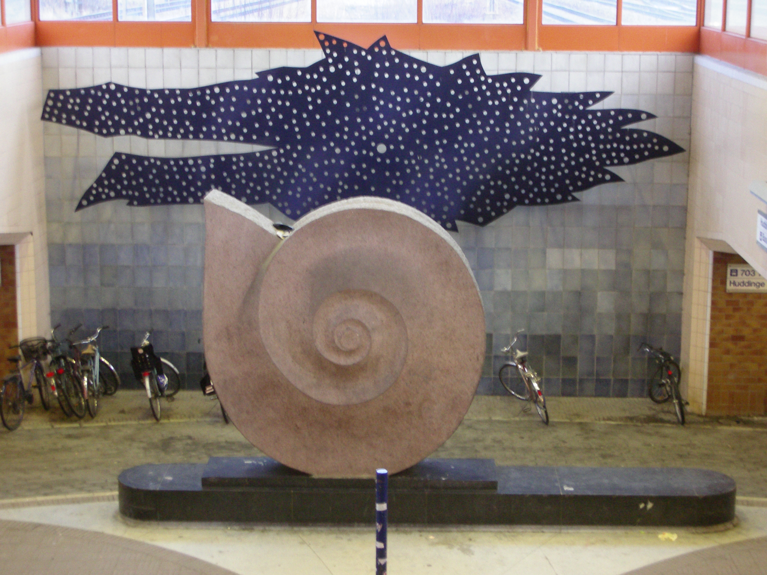 Nils G. Stenqvist. Huddinge järnvägsstation